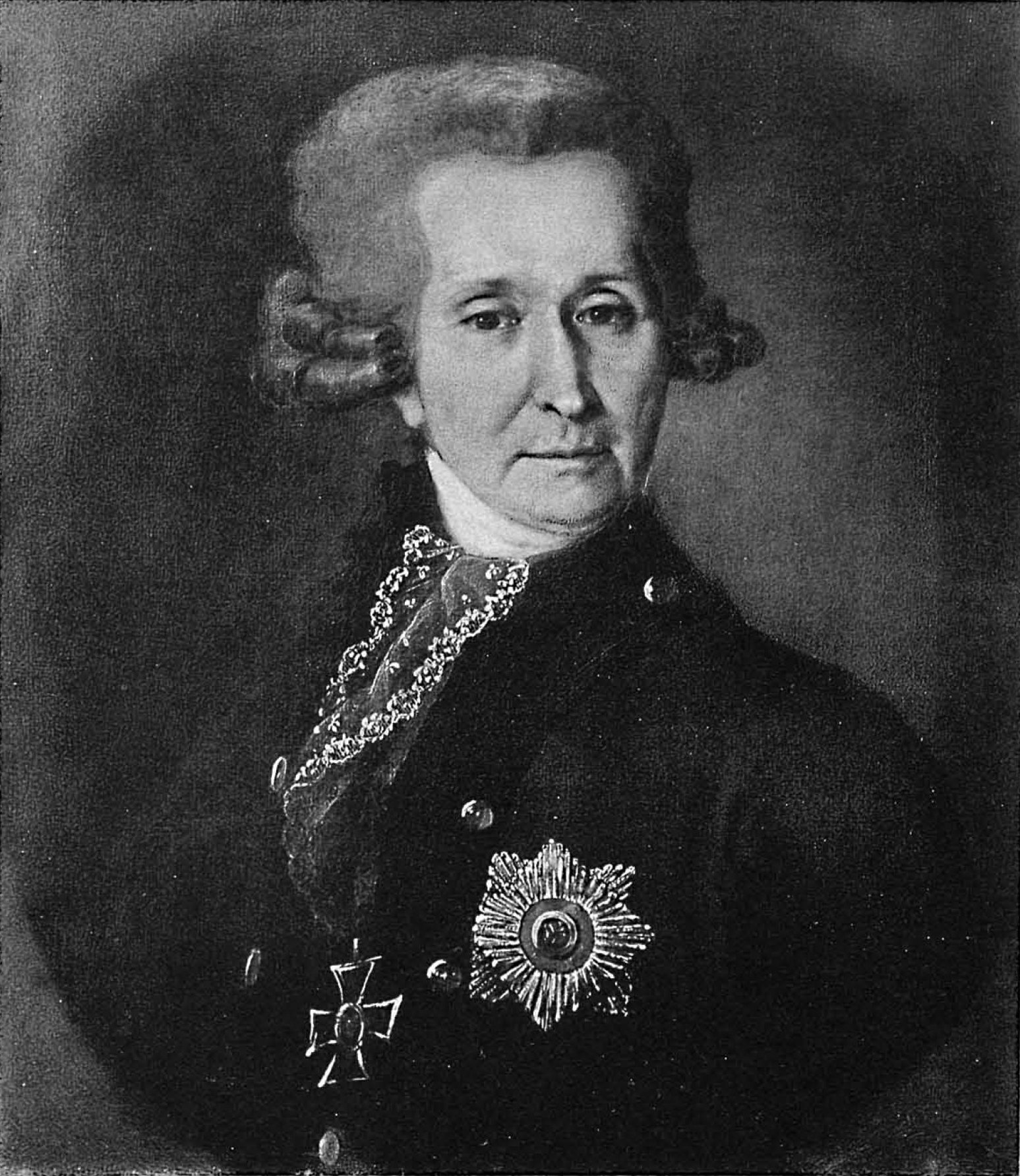 Шешковский, Степан Иванович. Происхождение: Собрание Михалковых в имении Петровское Рыбинского уезда Ярославской губ.